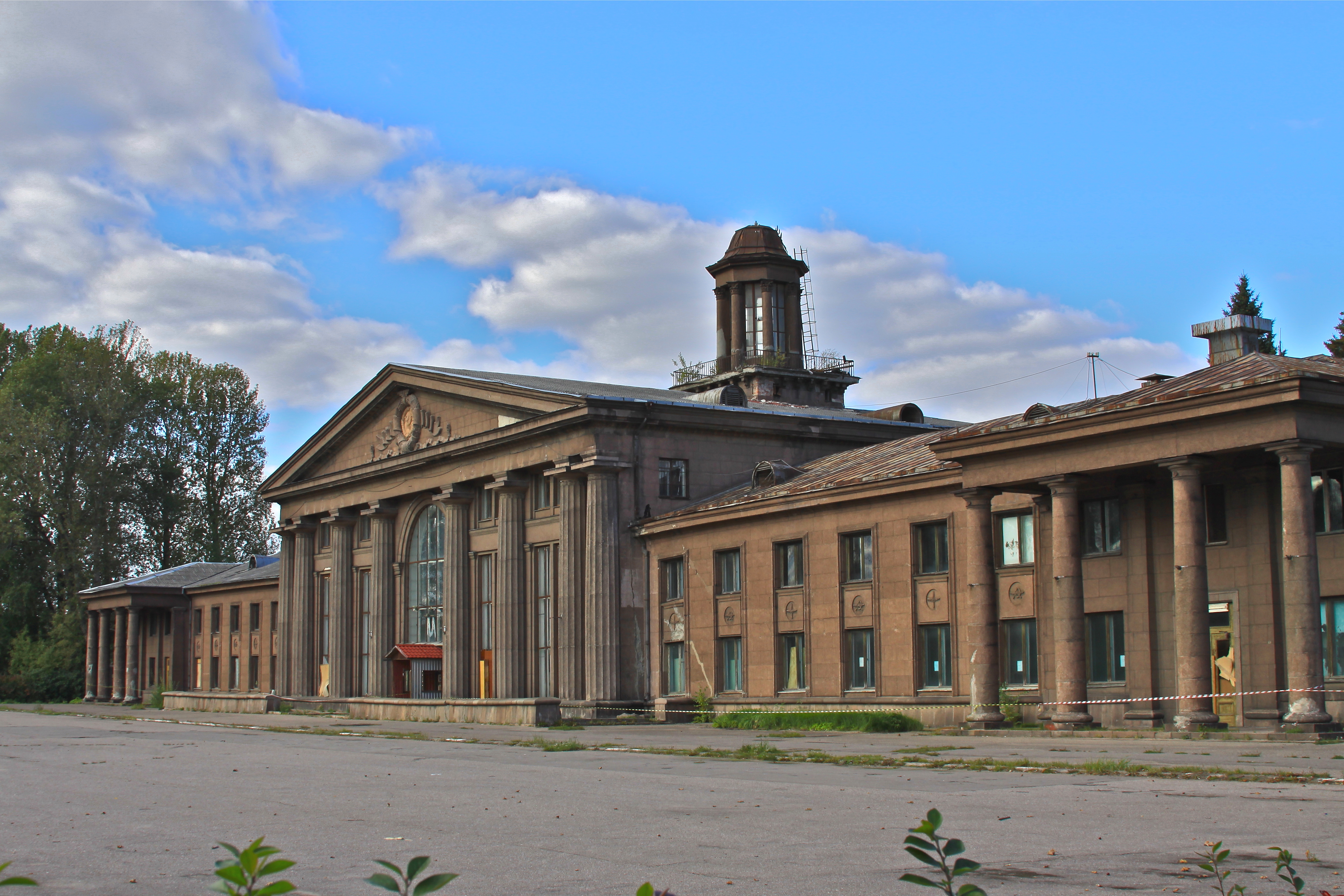 Фото здания аэровокзала бывшего аэропорта Спилве в Риге